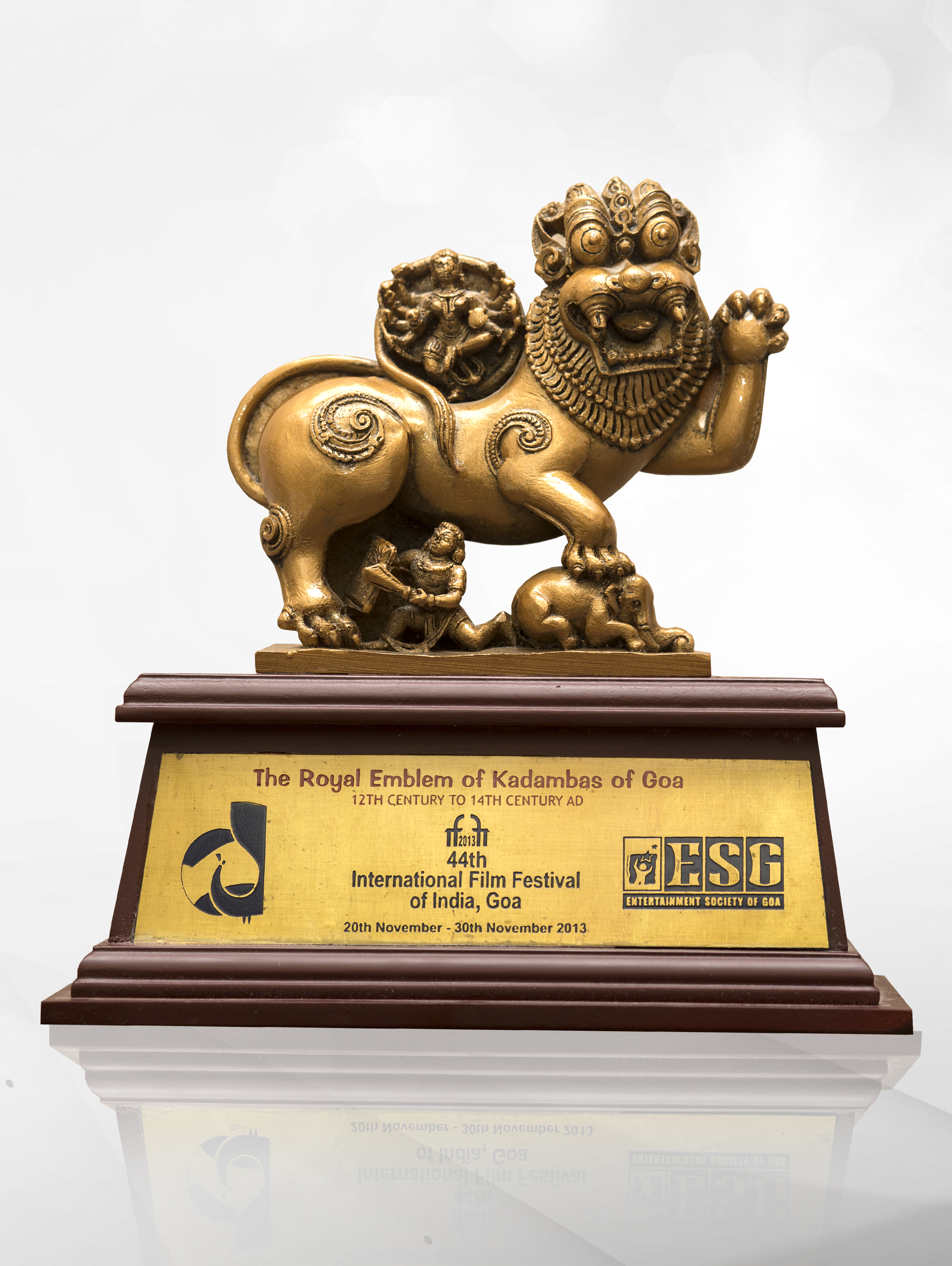 Тоҷикӣ: Таҳмина Раҷабова — барандаи ҷоизаи «Беҳтарин ҳунарпешаи зан» дар Ҷашнвораи байналмилалии филми Ҳиндустон (IFFI)